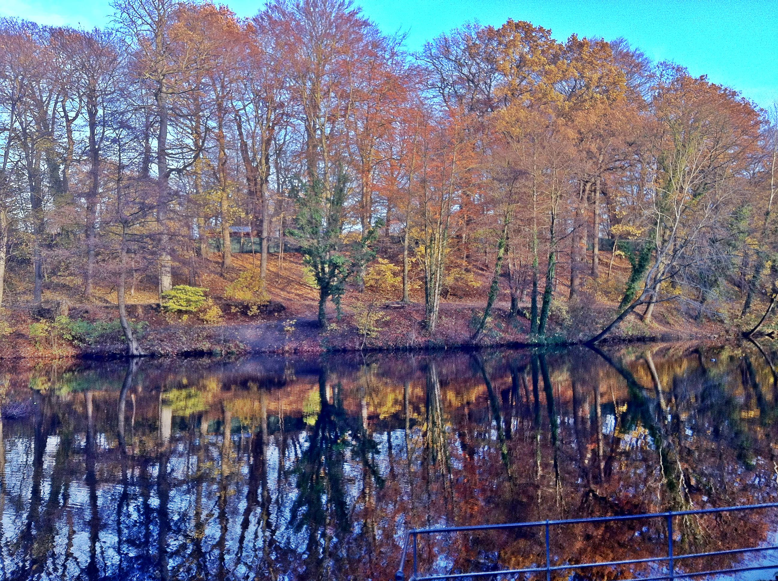 Wesselhoeftpark